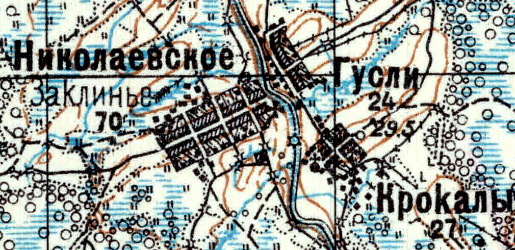 Топографическая карта Ленинградской области, квадрат VIc-27 (Залустижье), деревня Николаевское